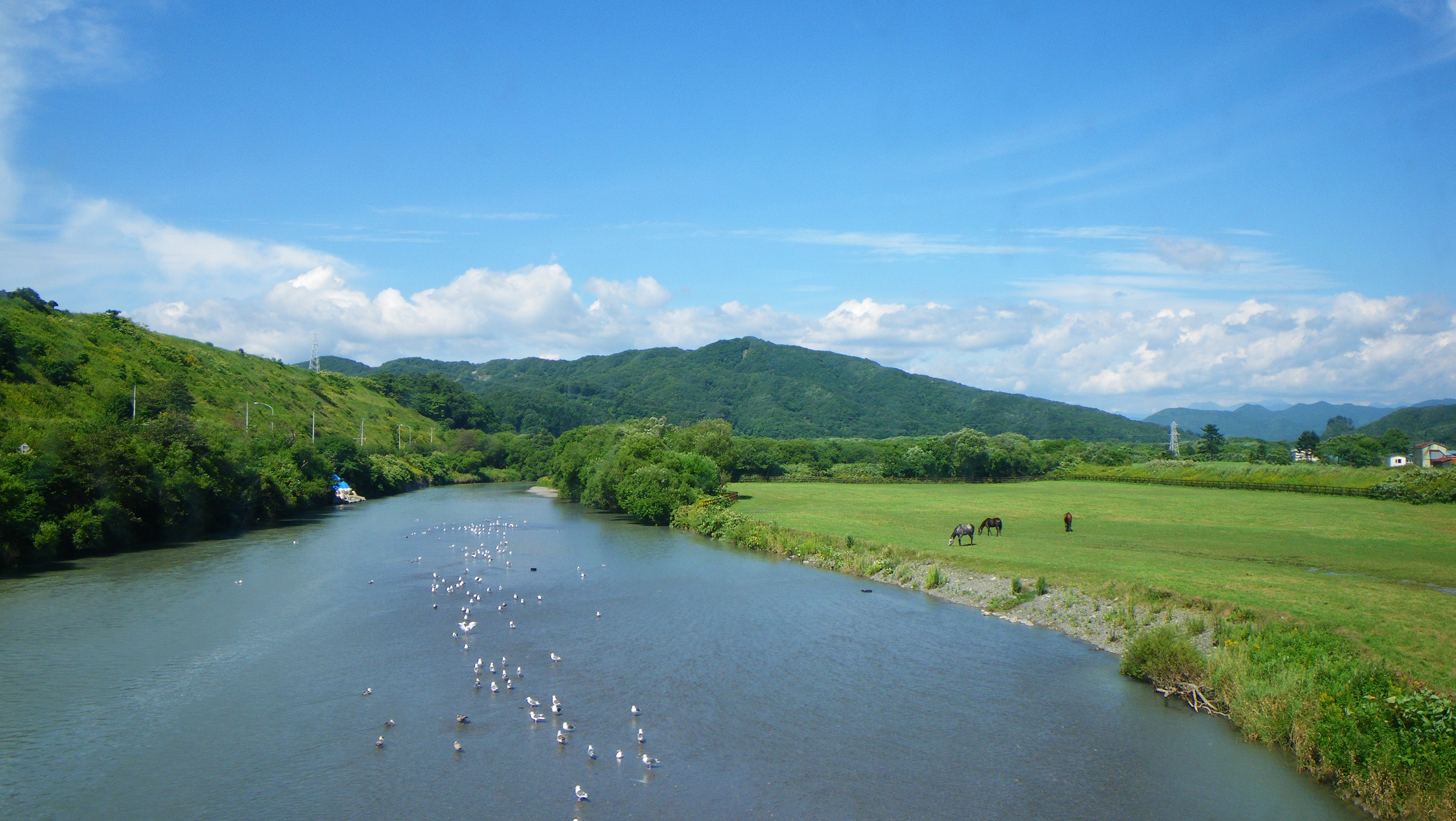 日高本線の蓬栄駅～日高三石駅間の三石川を渡りながら山側を望む。サラブレッドの生産牧場が点在している。